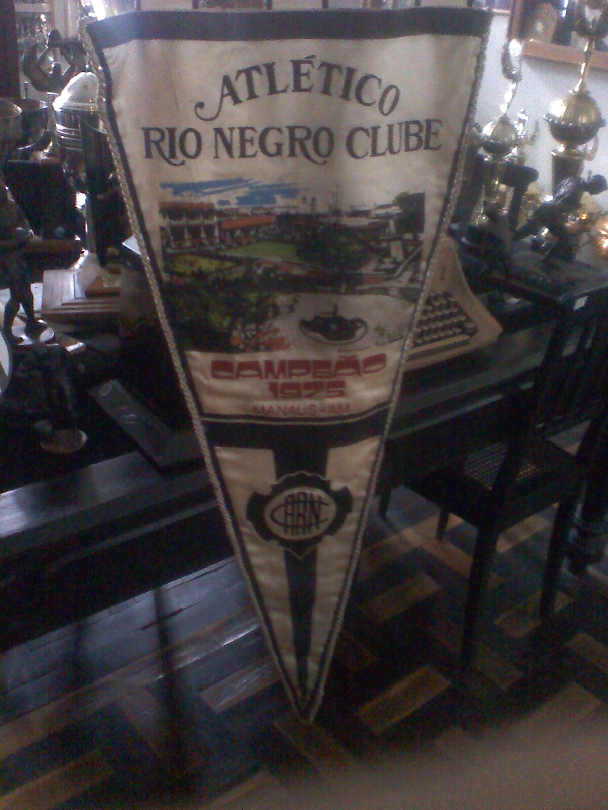 Flamula do Rio Negro comemorativa ao Campeonato conquistado em 1975